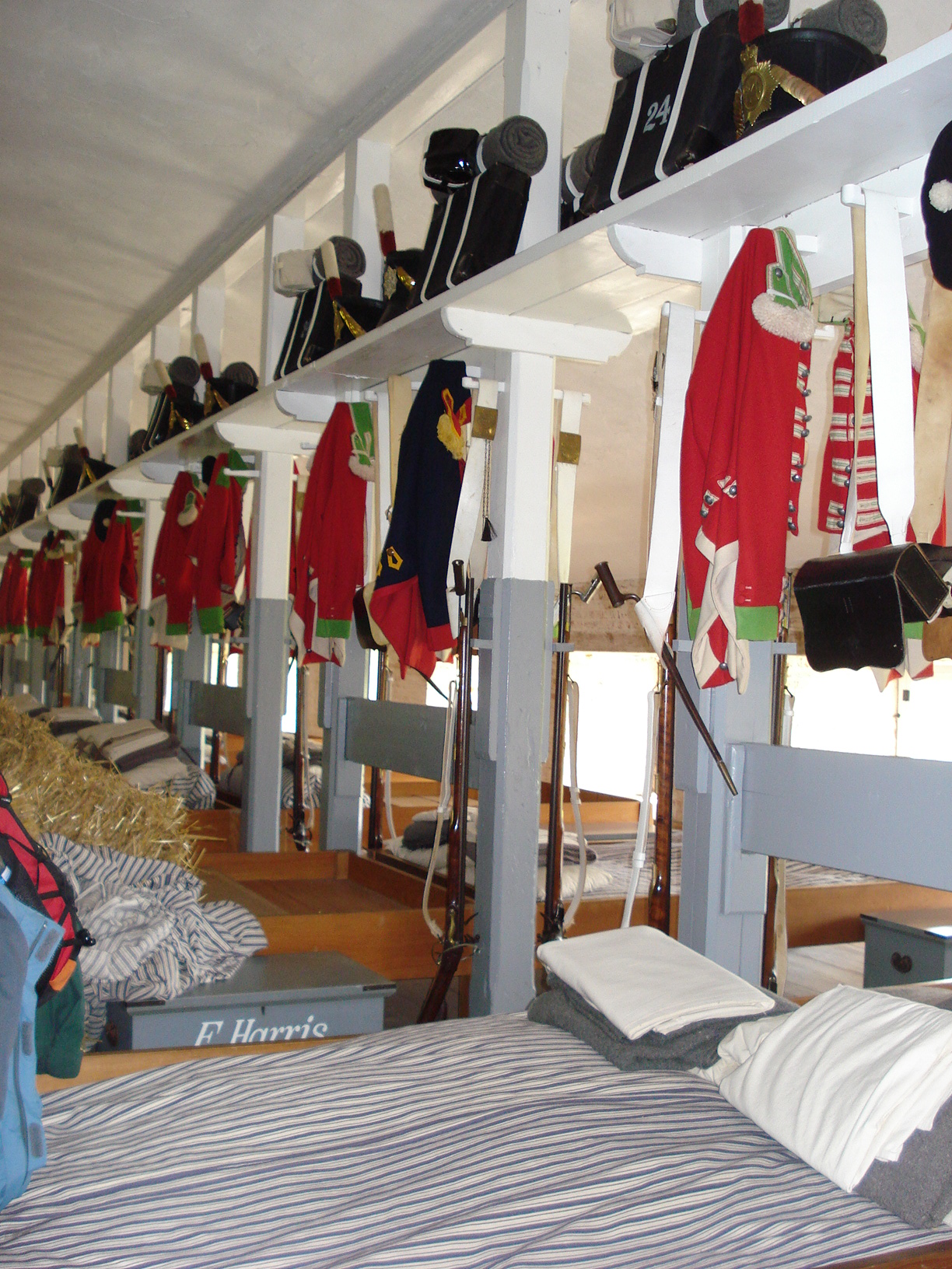 Fort Lennox sur l'île-aux-Noix sur la rivière Richelieu (Québec)